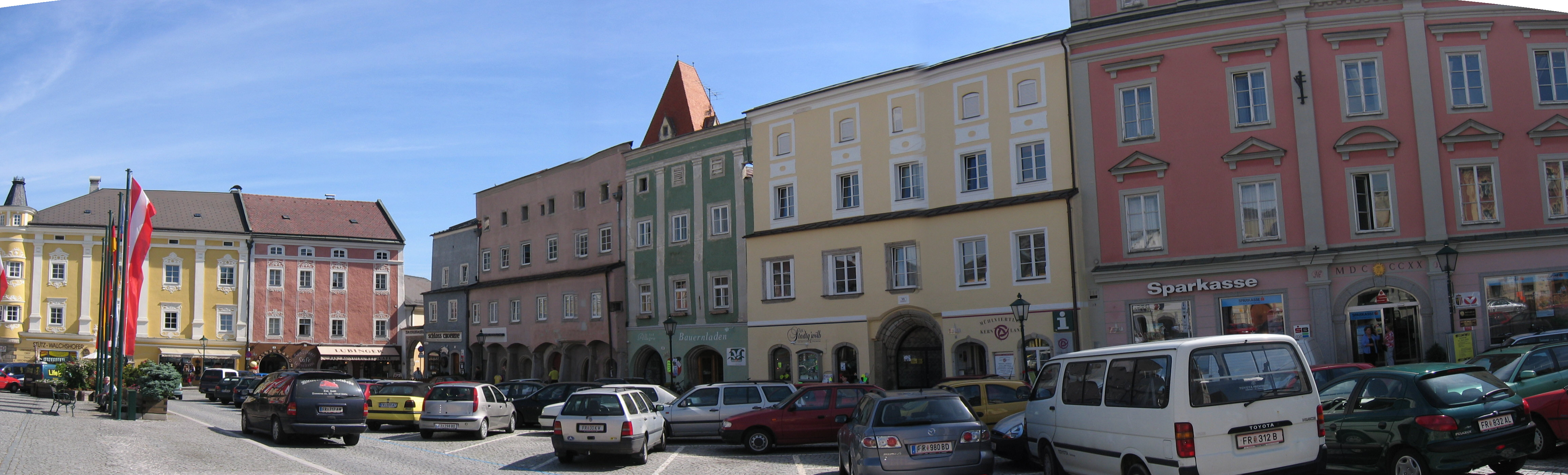 Hauptplatz von Freistadt, OÖ - rechte Seite in Richtung Böhmertor